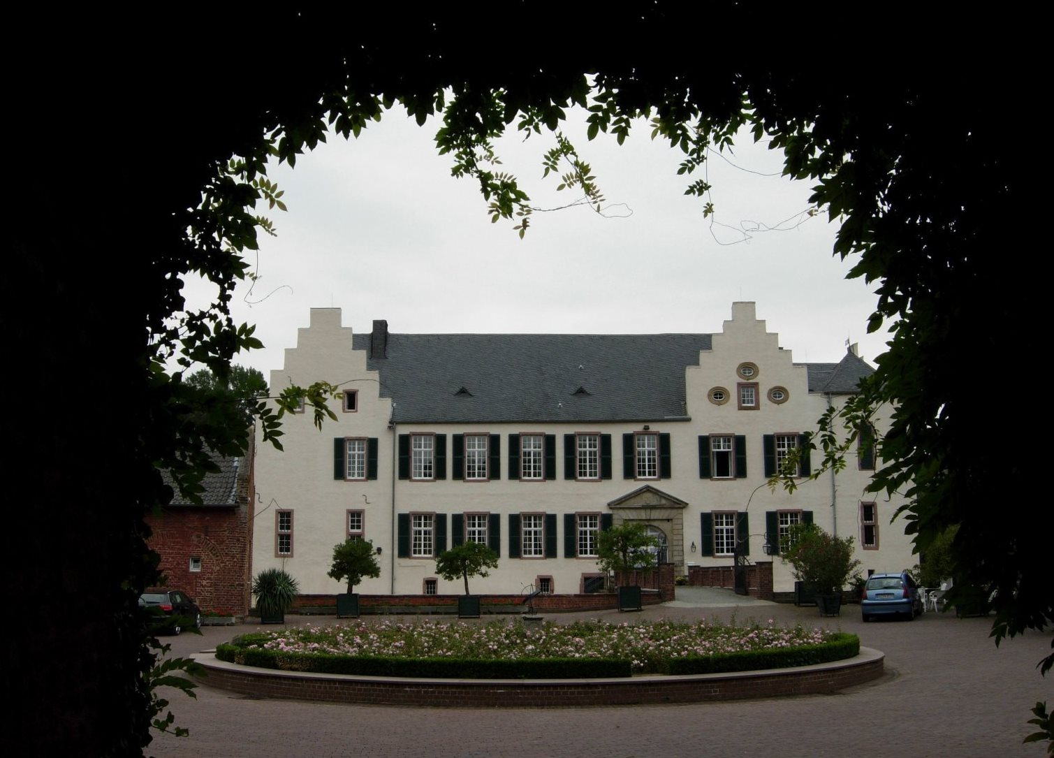 Wasserburg Heimerzheim (Swisttal)